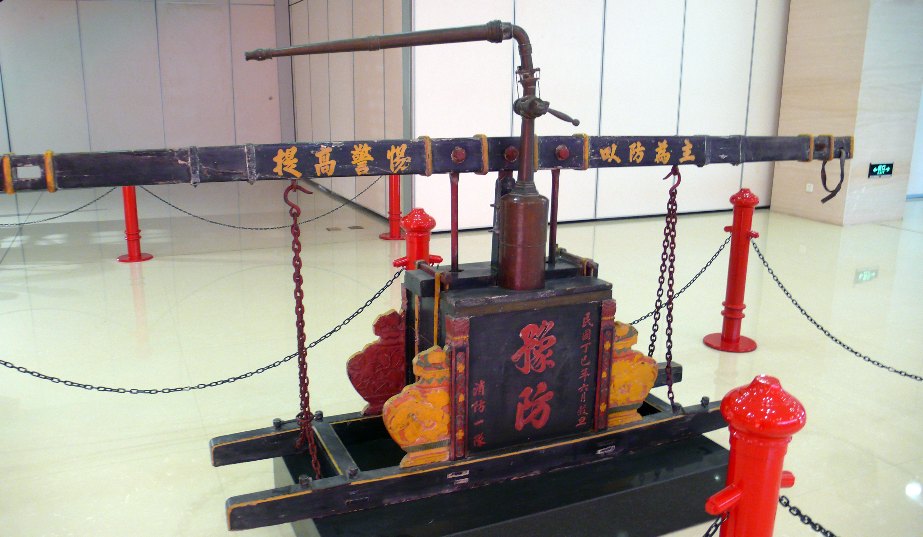 天津的水会（民间消防组织）所使用的人力水龙（气压手动机械水泵）。